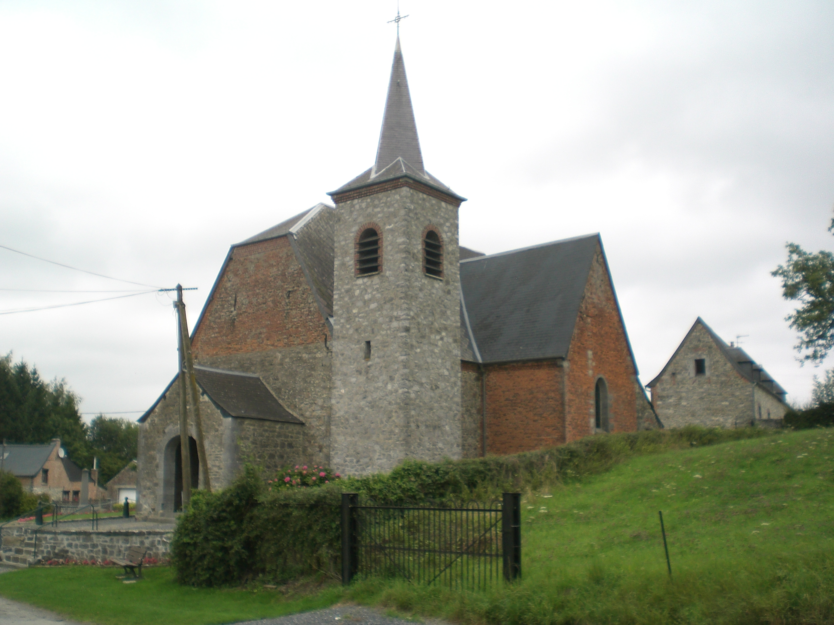 eglise de Rainsars nord france